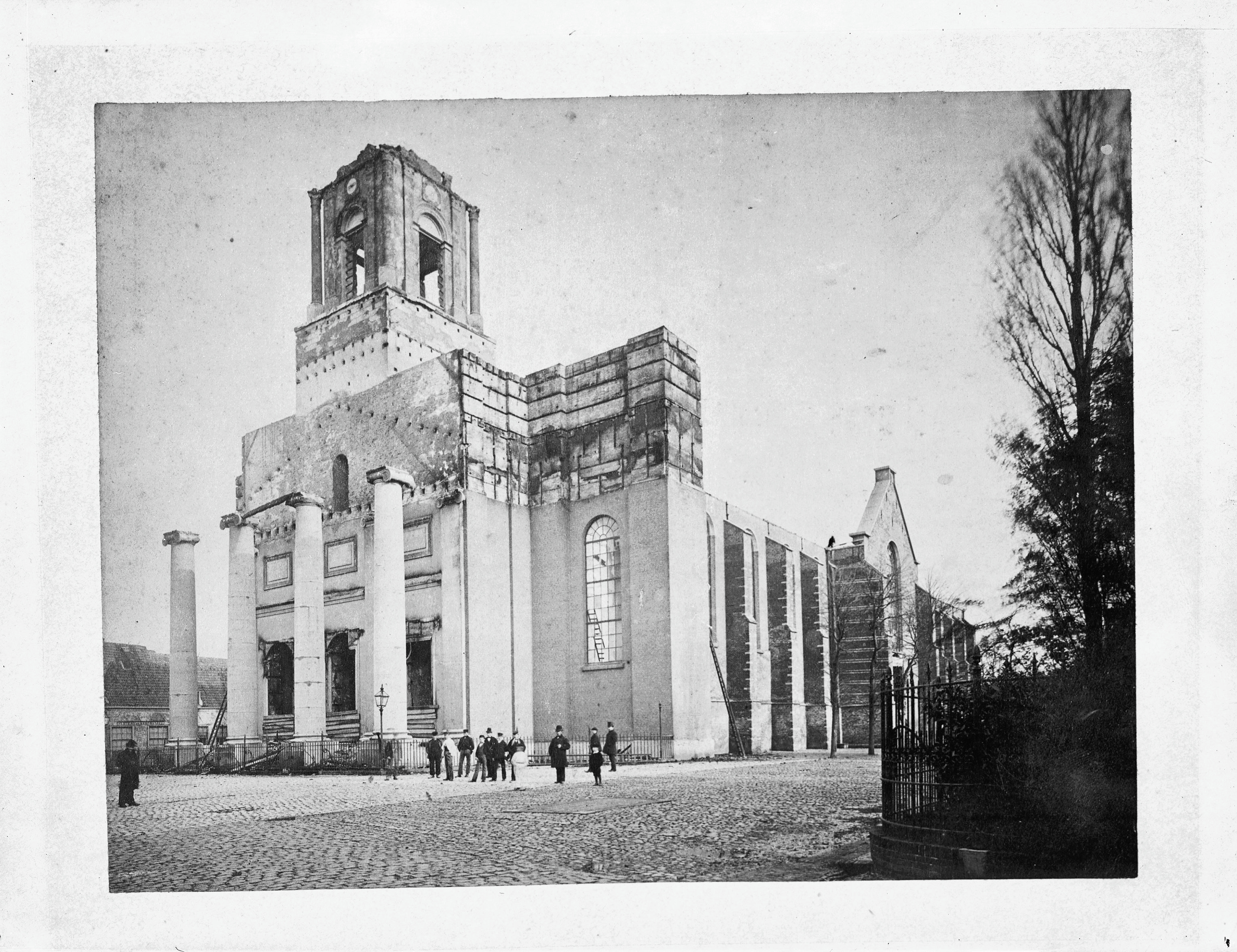 Grote Kerk N.H.: exterieur kerk uit het zuidwesten na brand van 1878